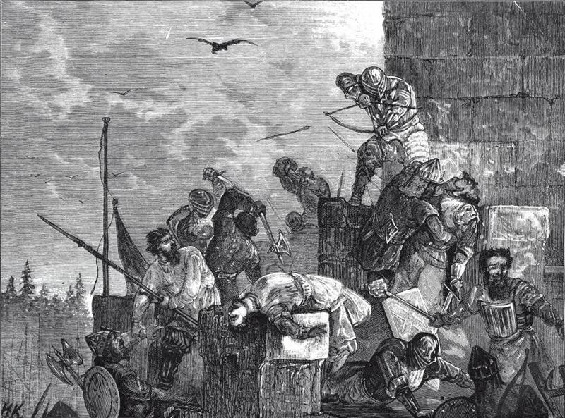 Взятие русскими Ландскроны (на месте, где теперь находится малая Охта). Картина описывает ключевой момент новгородско-шведской войны 1301 года - взятие войском Новгородской республики шведской крепости Ландскрона в устье Невы. Художник Каразир, гравер Напер. Набросок П.Петрова. Это картина - собственность журнала Нива. Опубликована до 1917 года в журнале Нива.